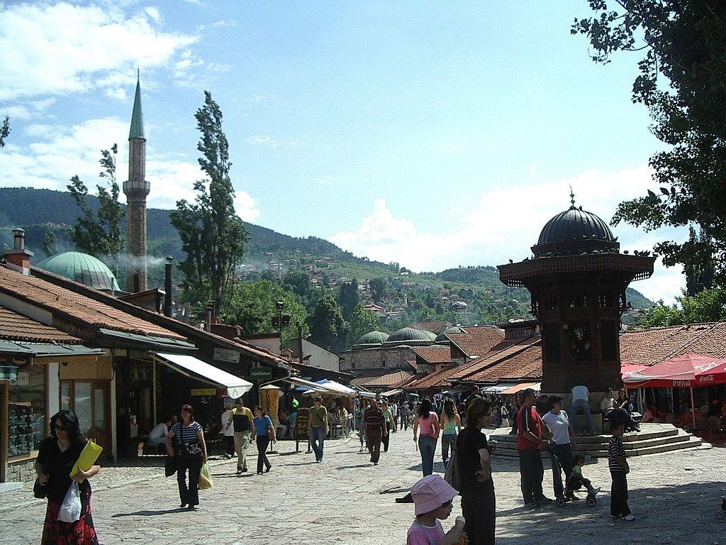 Fountain Sebilj in Baščaršija, Sarajevo